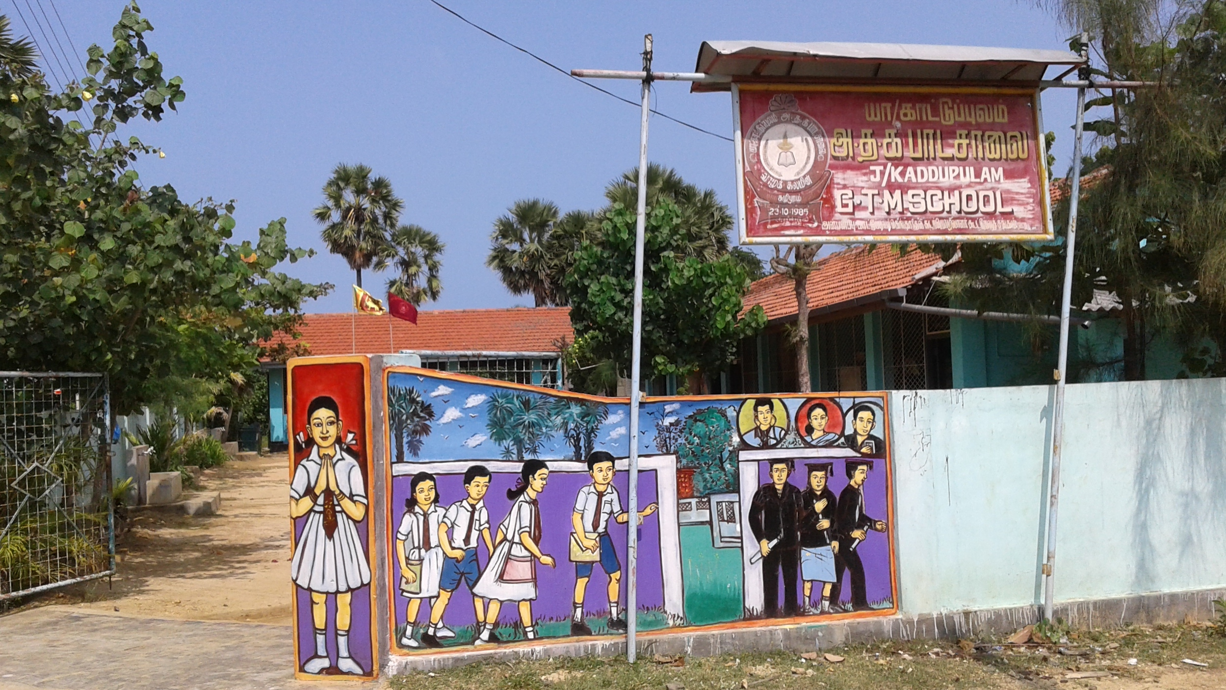 A.T.M School